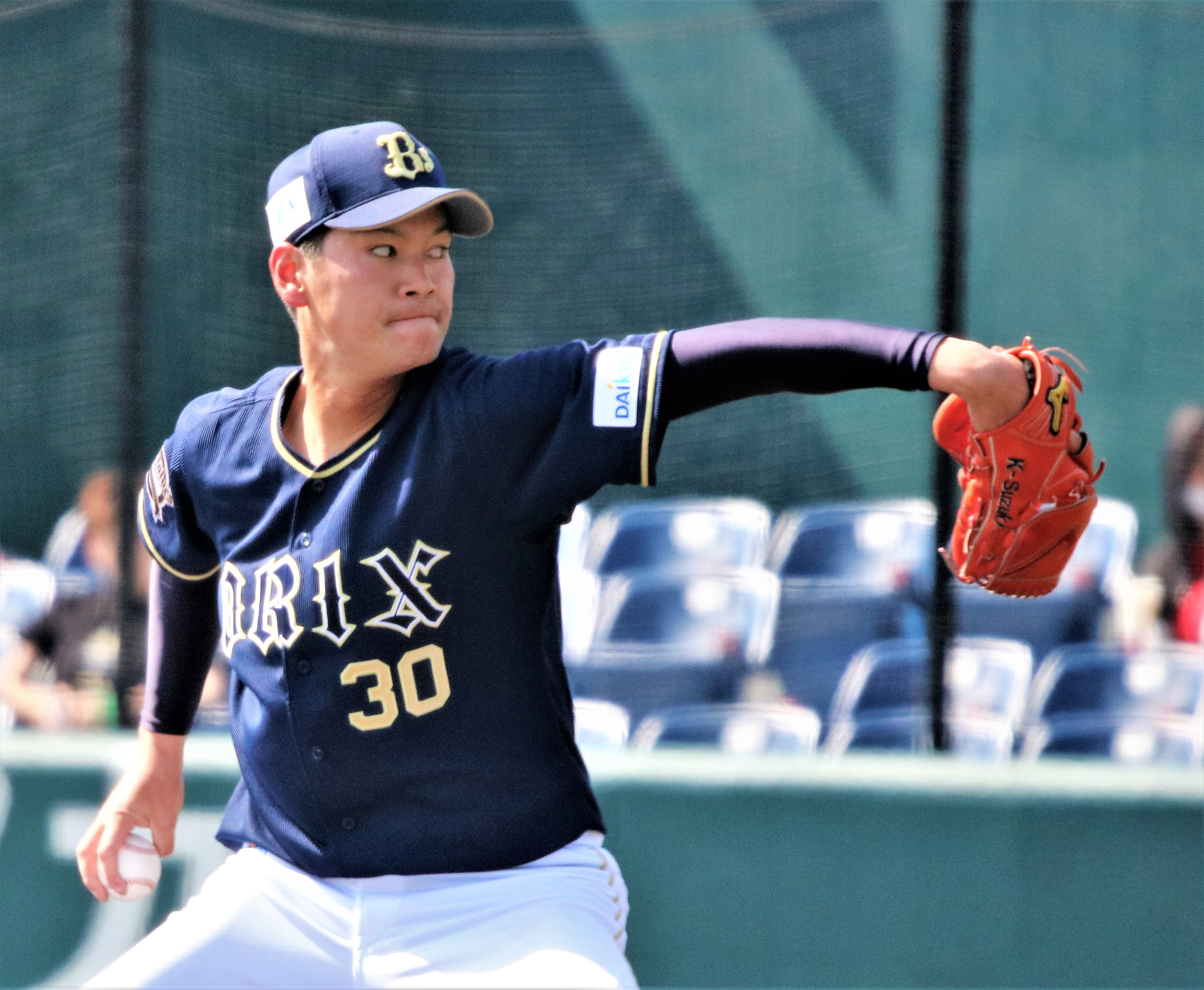 2018年4月20日タマホームスタジアム筑後